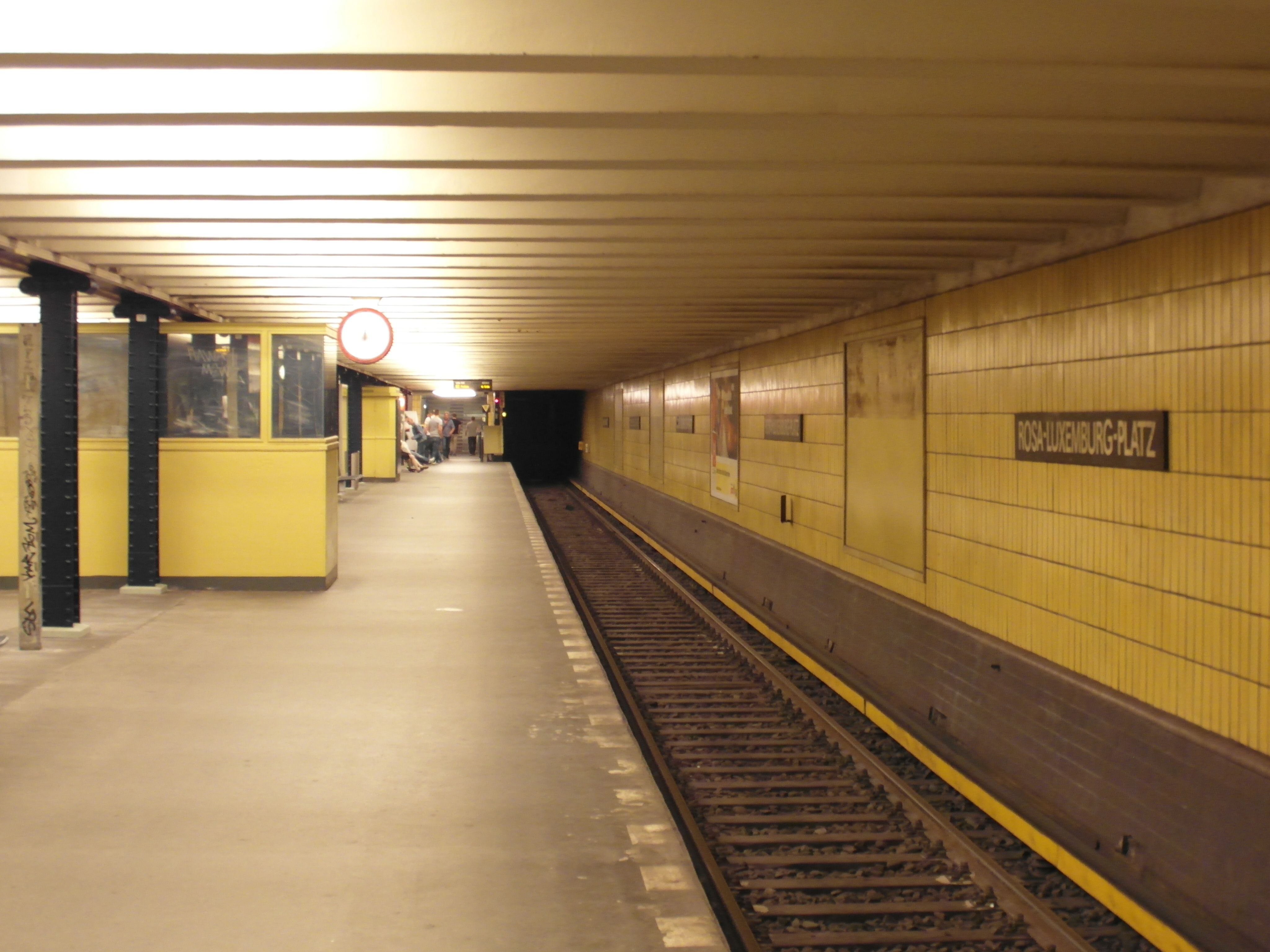 Linie U2